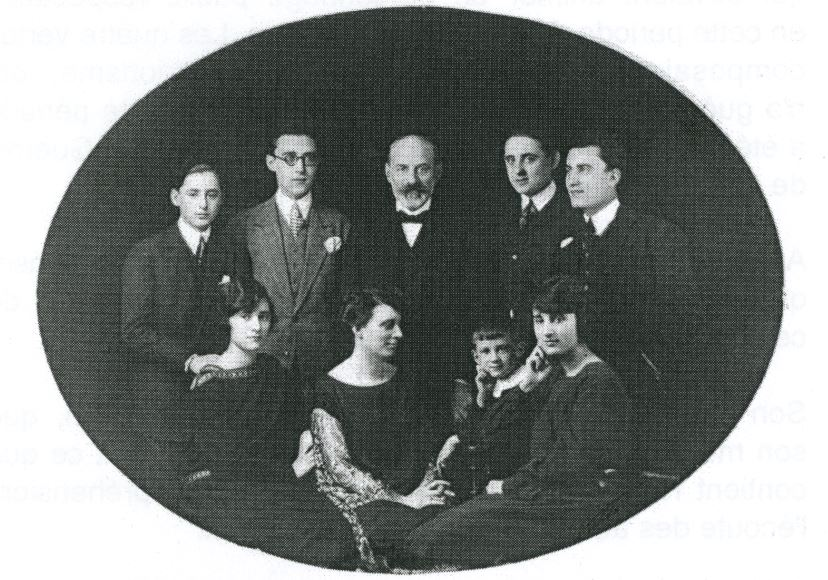 Photo famille ader